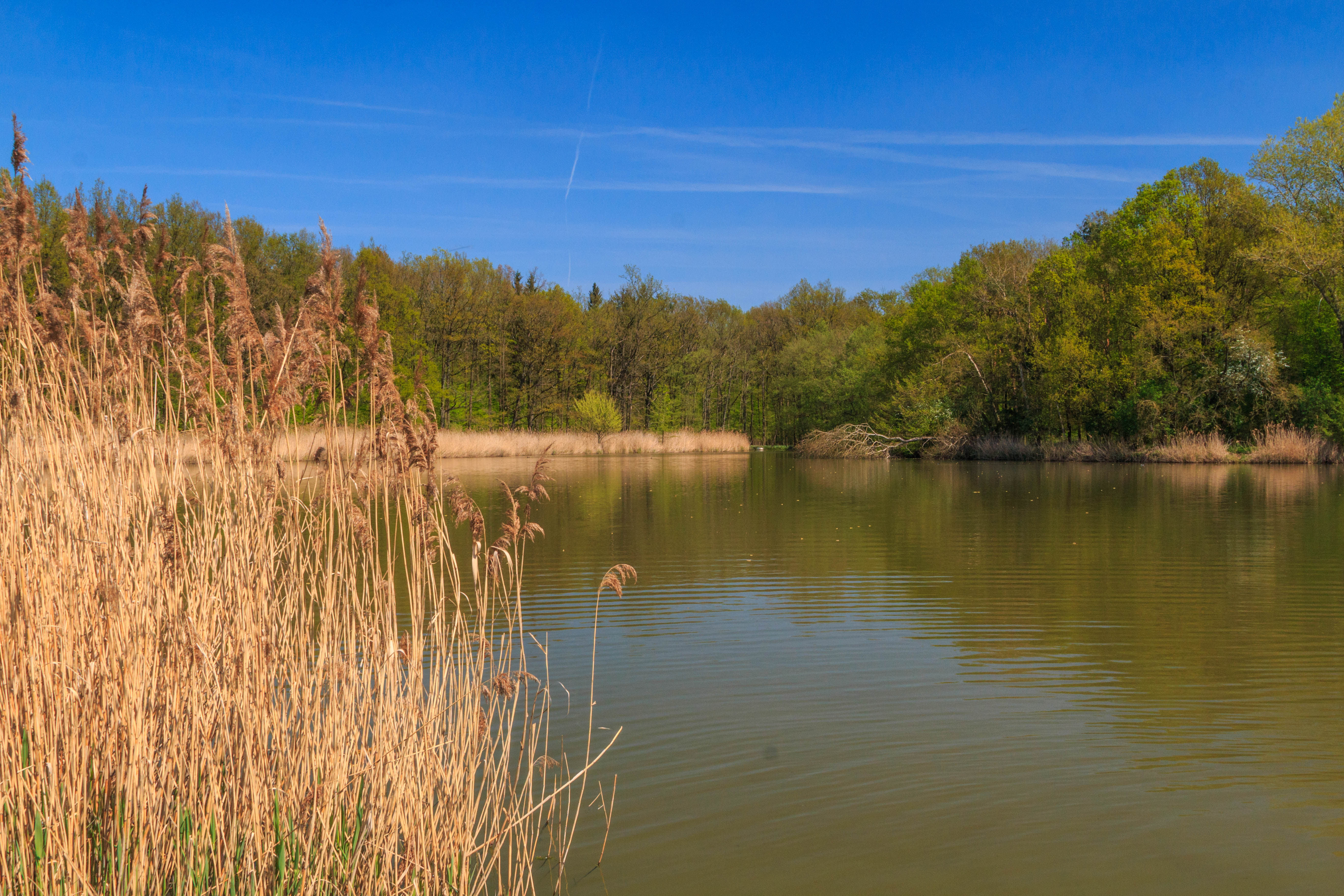 Nový rybník u osady Opatov Project: Vodstvo.